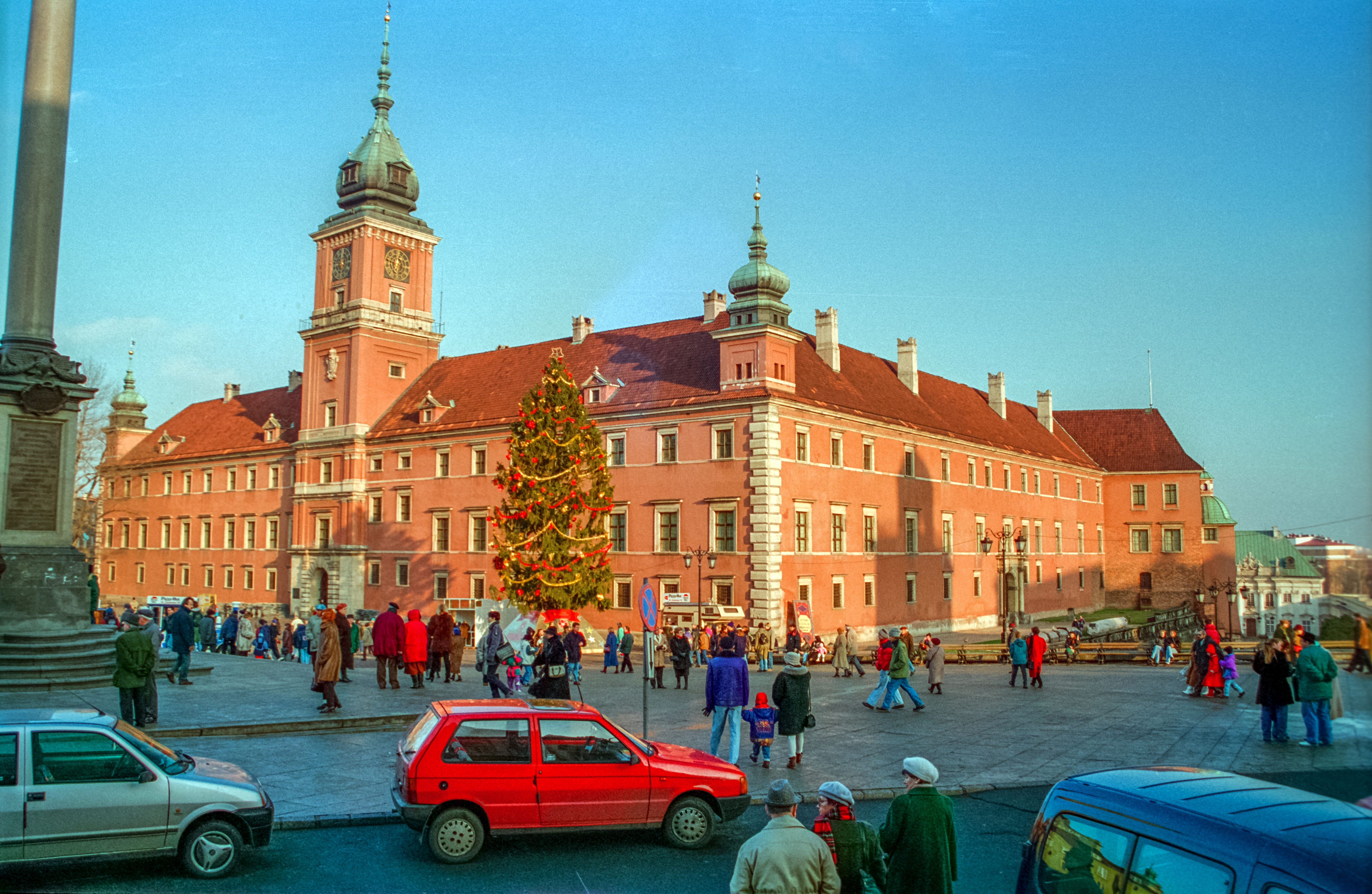 Poland, Warszawa Castle